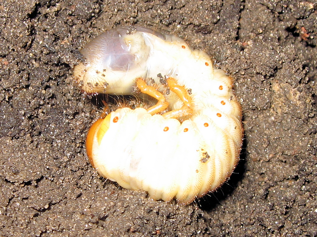 Engerling (Maikäferlarve)